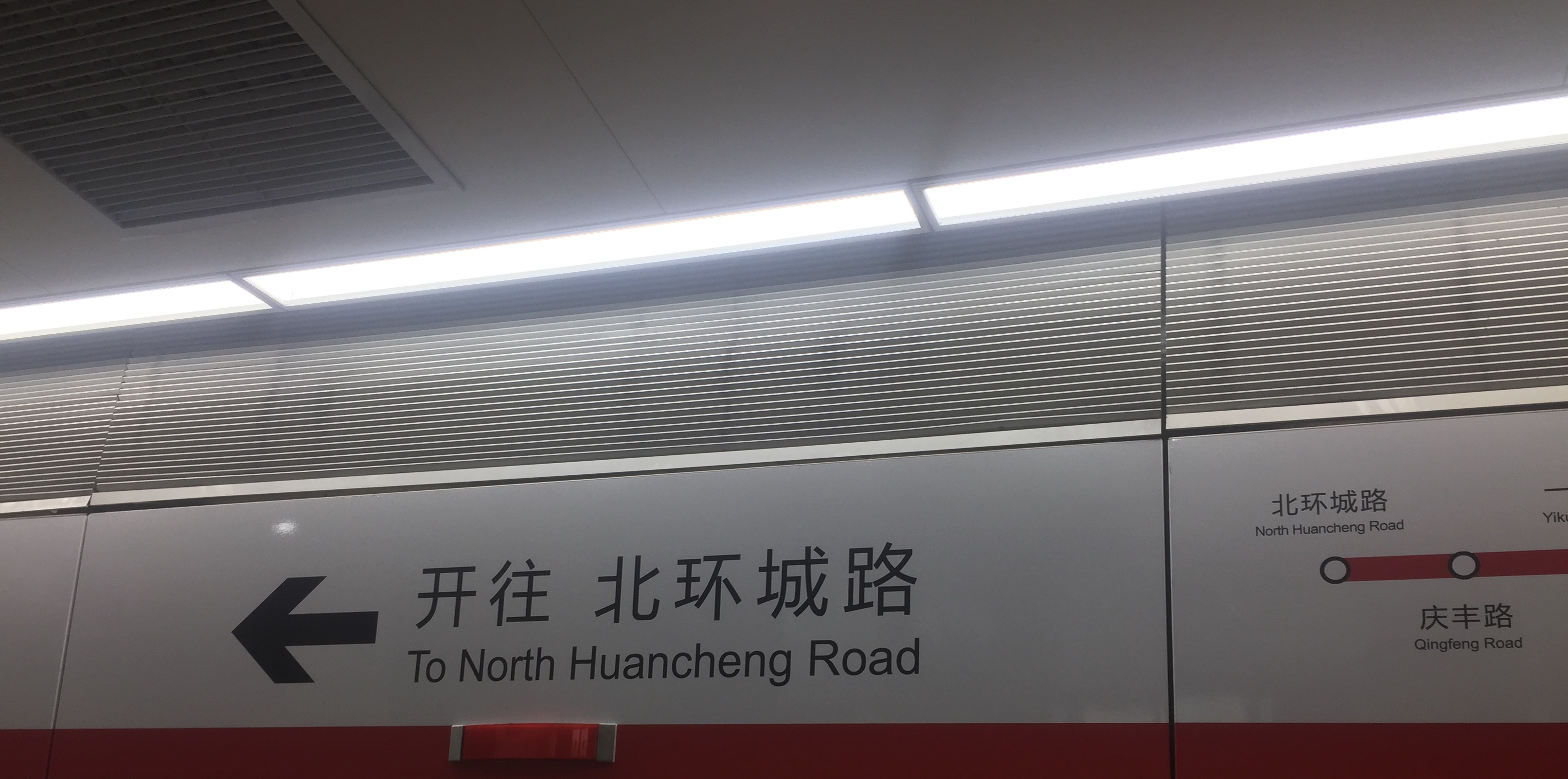 中文（中国大陆）: 长春轨道交通一号线新贴图 北环城路站方向 解放大路站